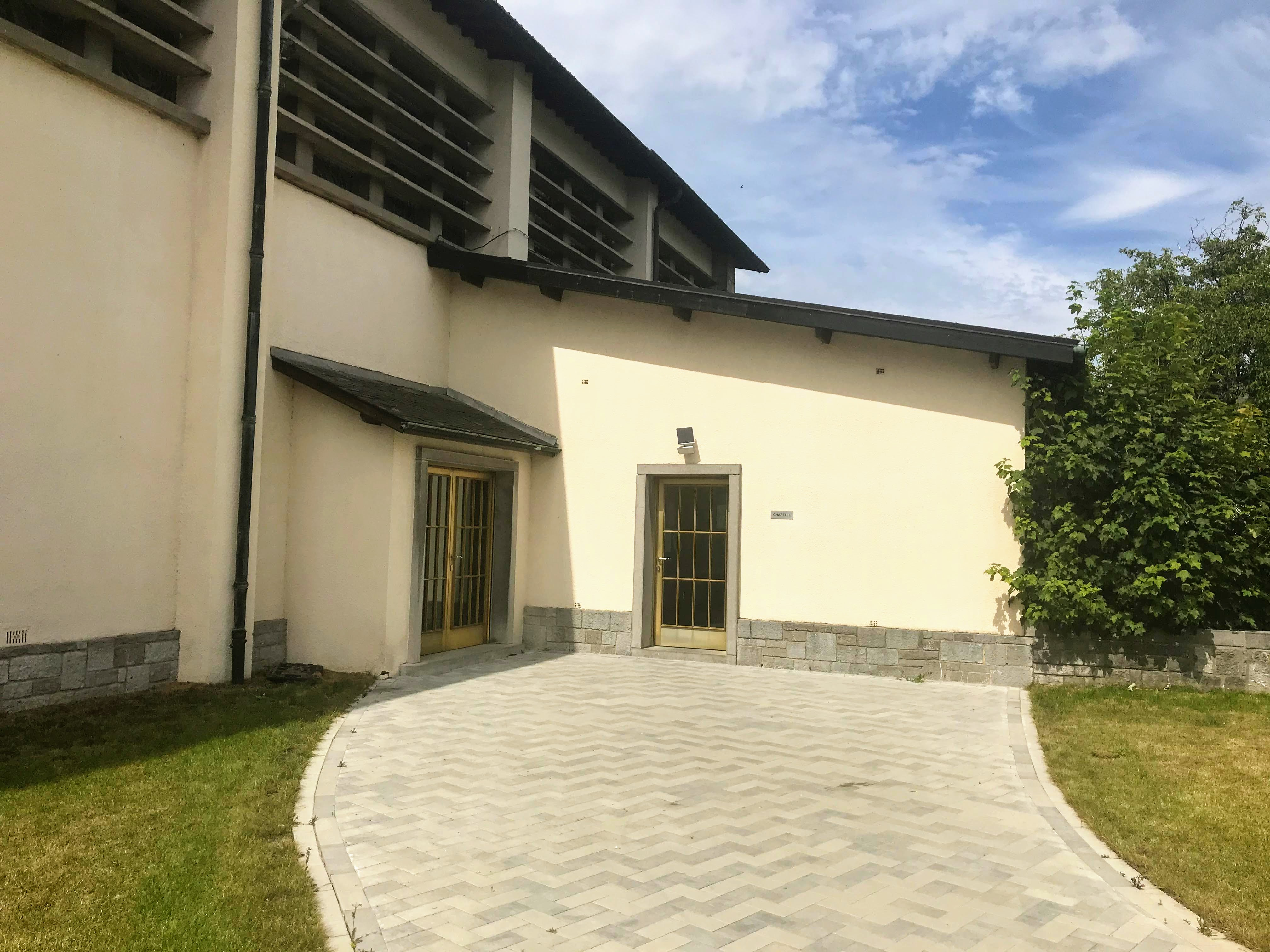 Entrée de la chapelle de semaine de Marloie